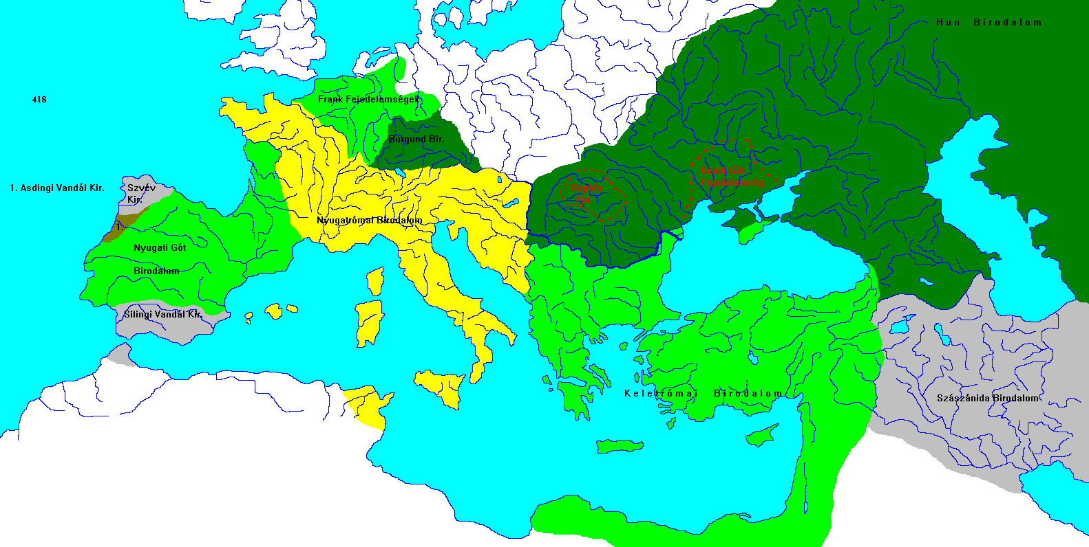 Európa politikai térképe 418-ban